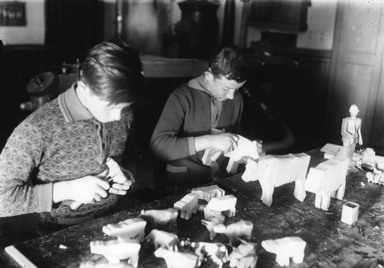 Aufnahme 1929 Seiffen Erzgebirge Spielzeug-Fachschule: Die mit der Bandsäge roh aus starken Brettern ausgesägten Holztiere erhalten mit dem Schmitzmesser die individuelle Form.